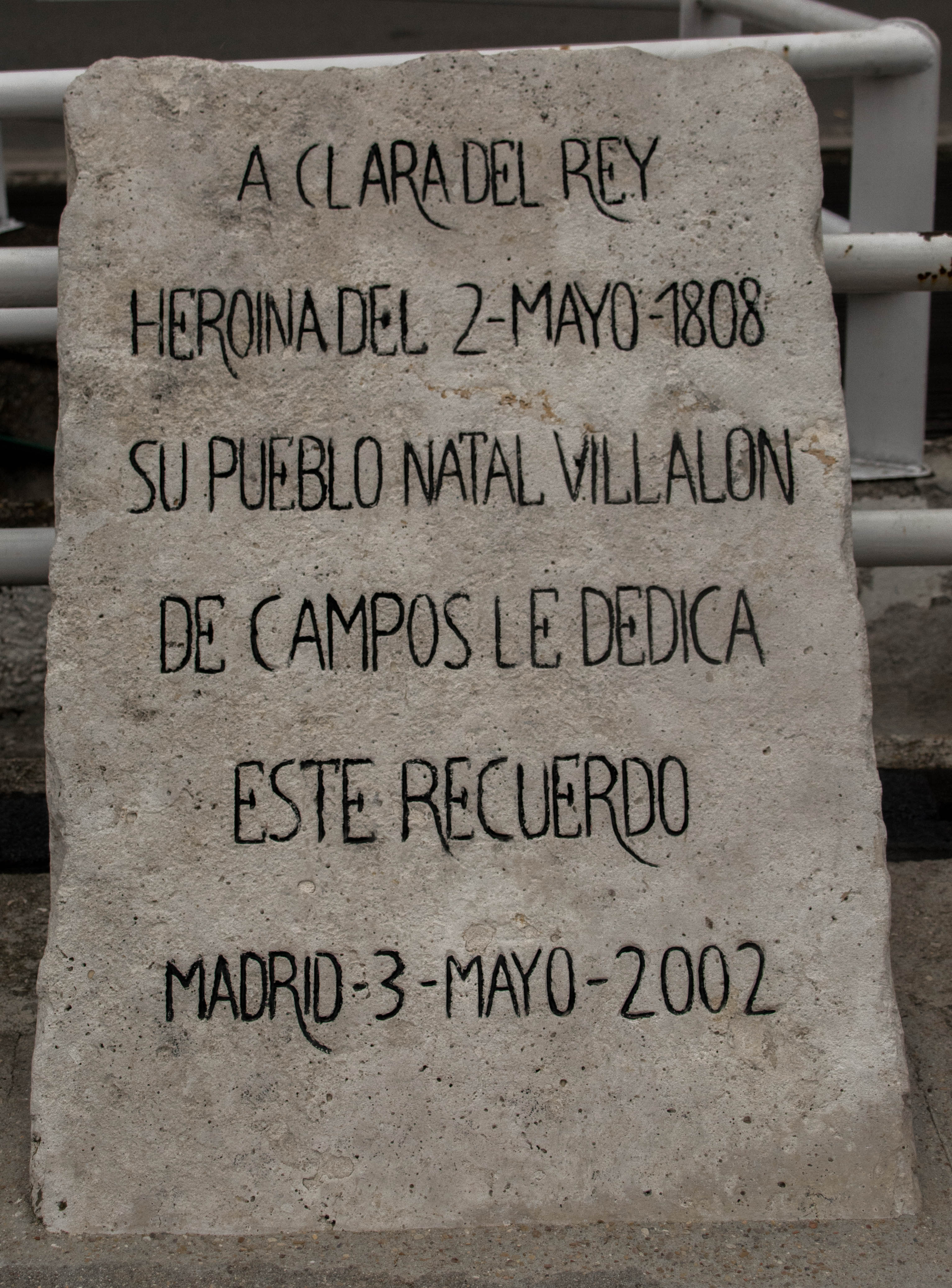 Lápida de Clara del Rey en los Jardines de Mario Benedetti, Madrid, 2018.